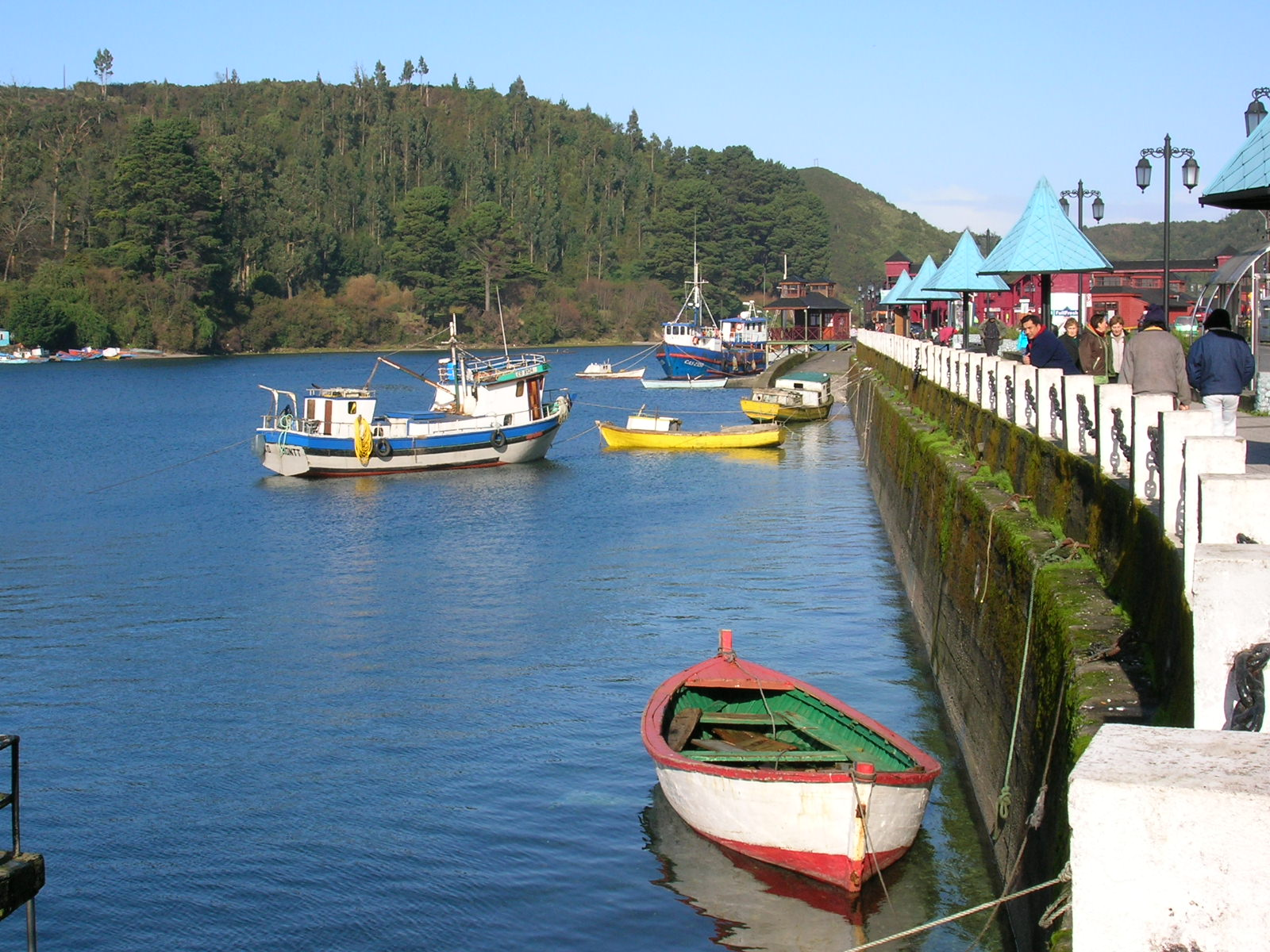 Vista de Angelmó,Puerto Montt - Chile